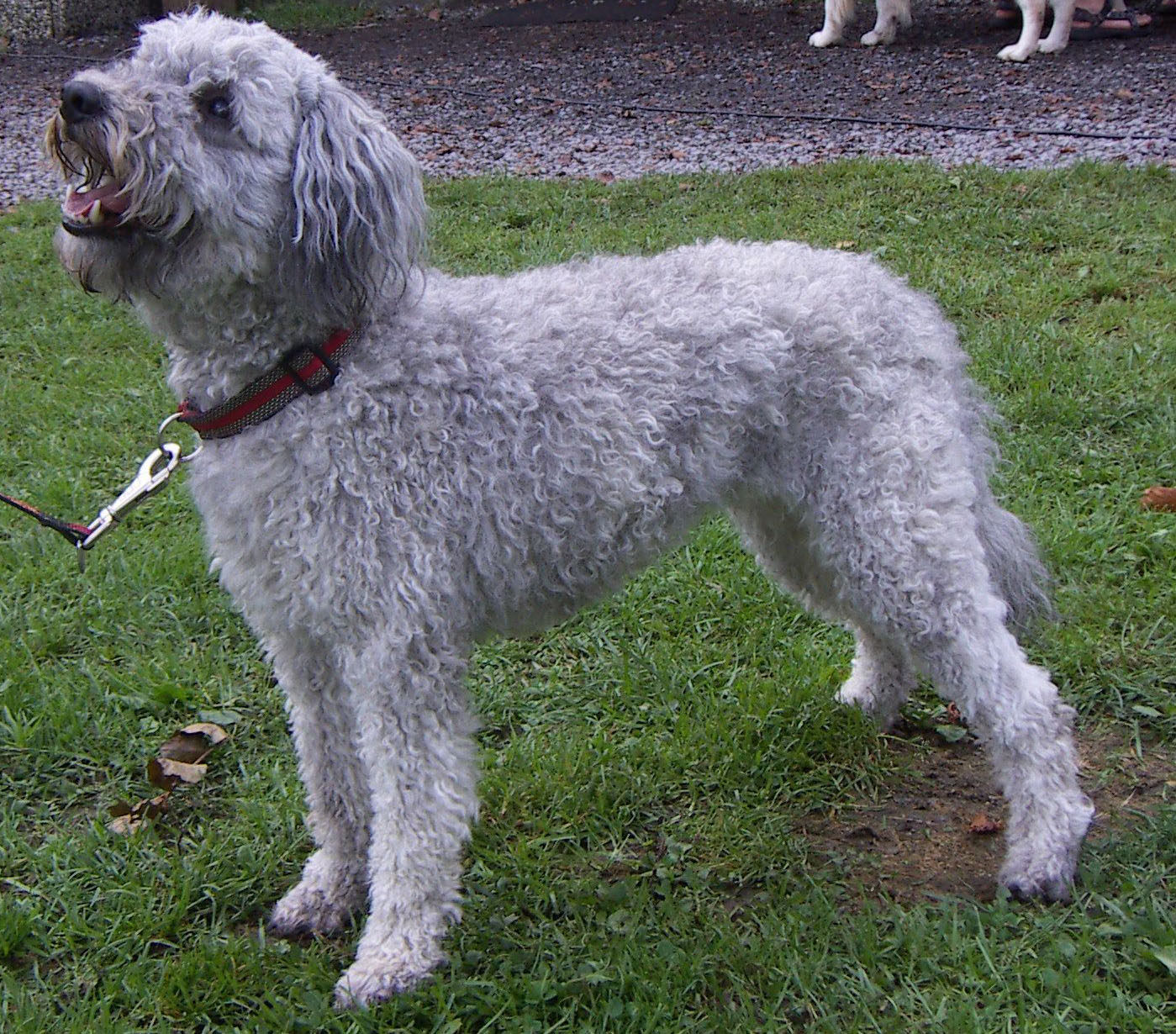 Pumi selbst fotografiert am 10.9.2005 von steffen heinz (caronna)